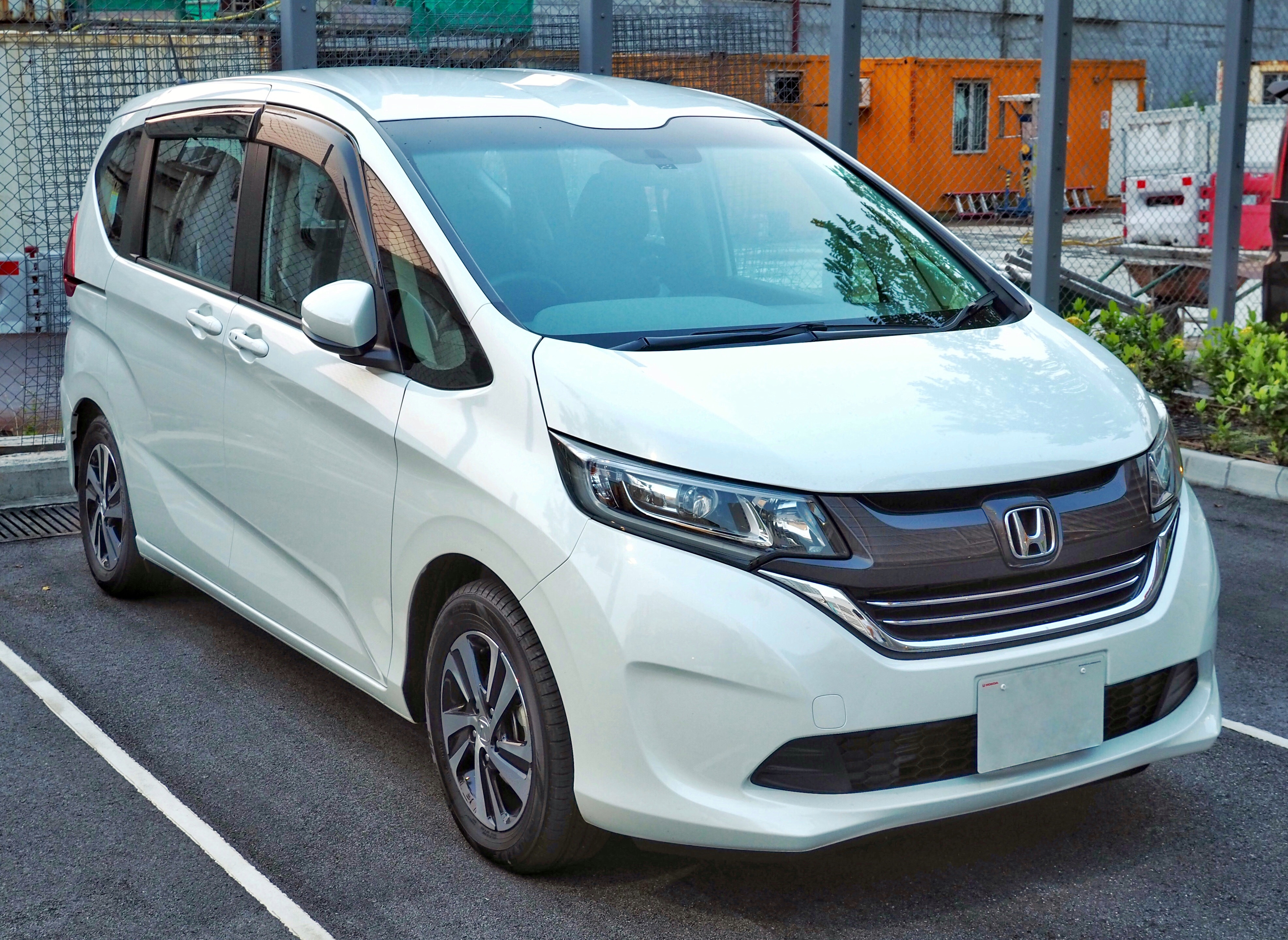 A 2016 Honda Freed taken in Jordan, Kowloon, Hong Kong.